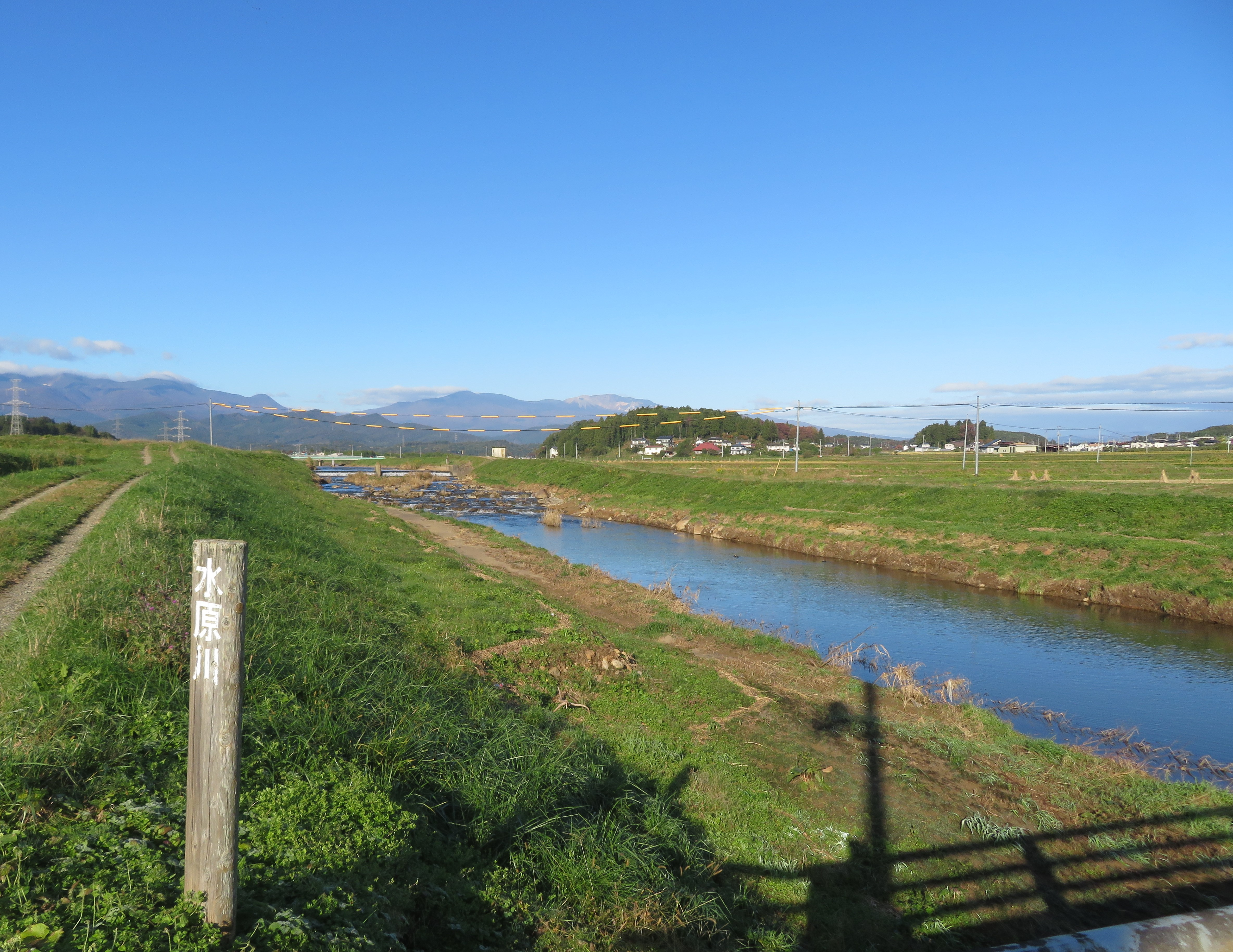 二本松市を流れる水原川（福島県道147号線観音堂橋から上流方向を撮影） Canon PowerShot SX720 HS